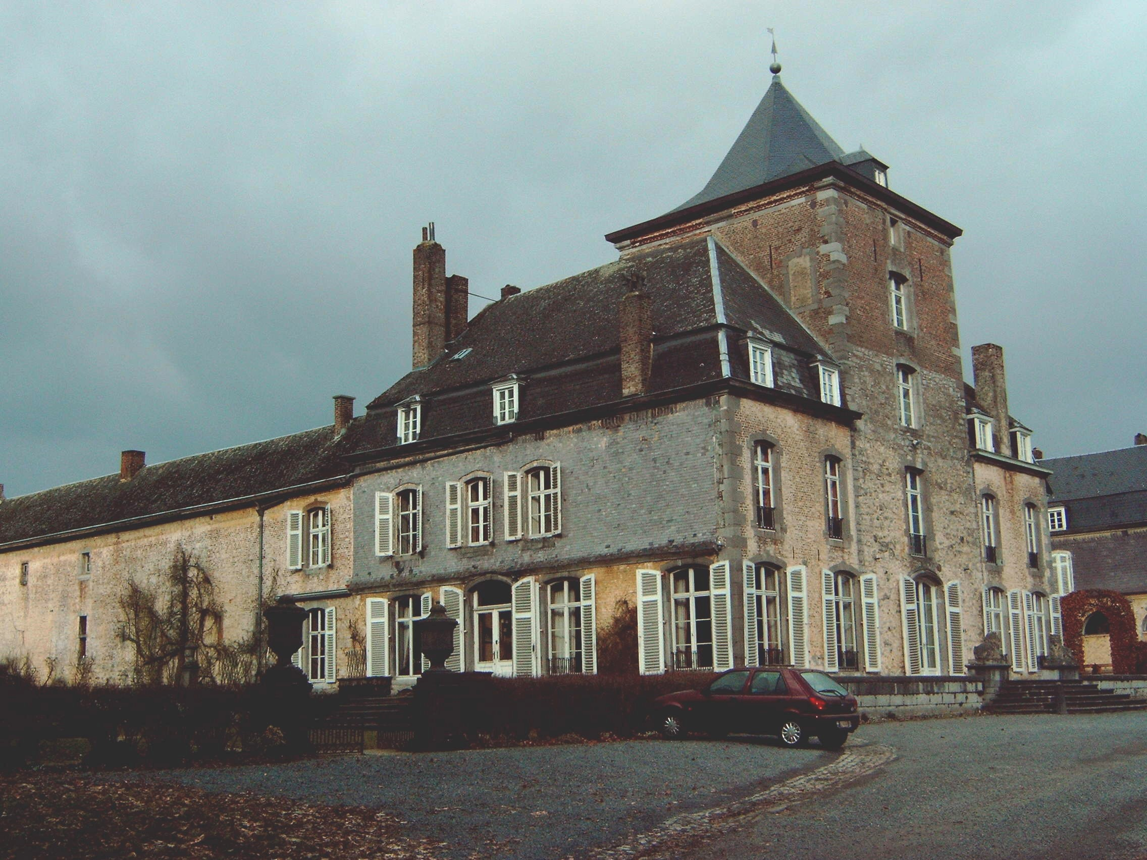 Het kasteel van Andoy (Namen). Eigen opname van 26-2-2006.